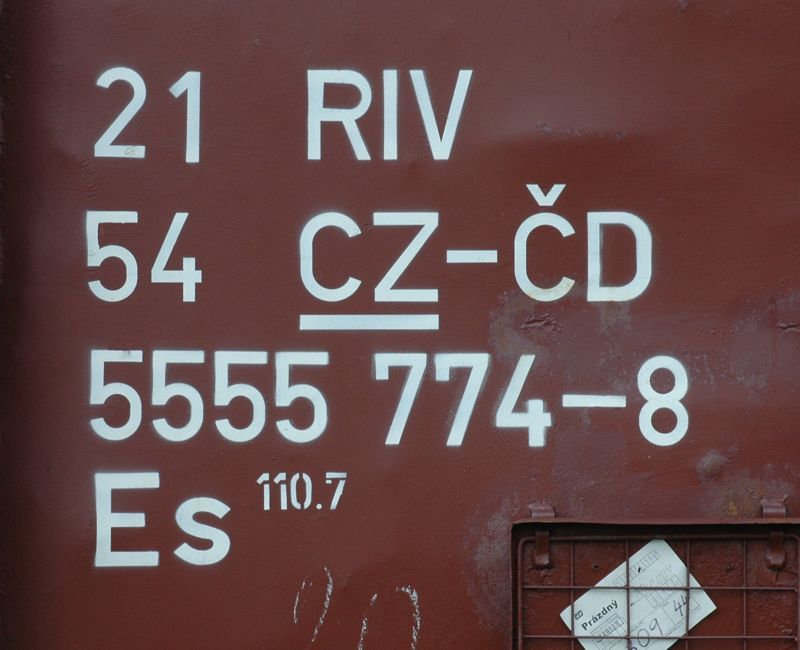 Číselné označení železničního nákladního vozu řady Es, dříve Vte